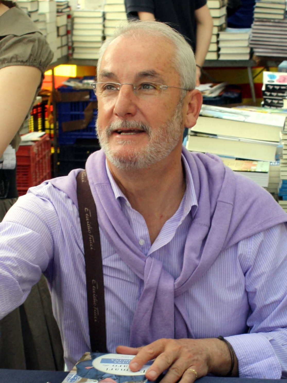 Txumari Alfaro